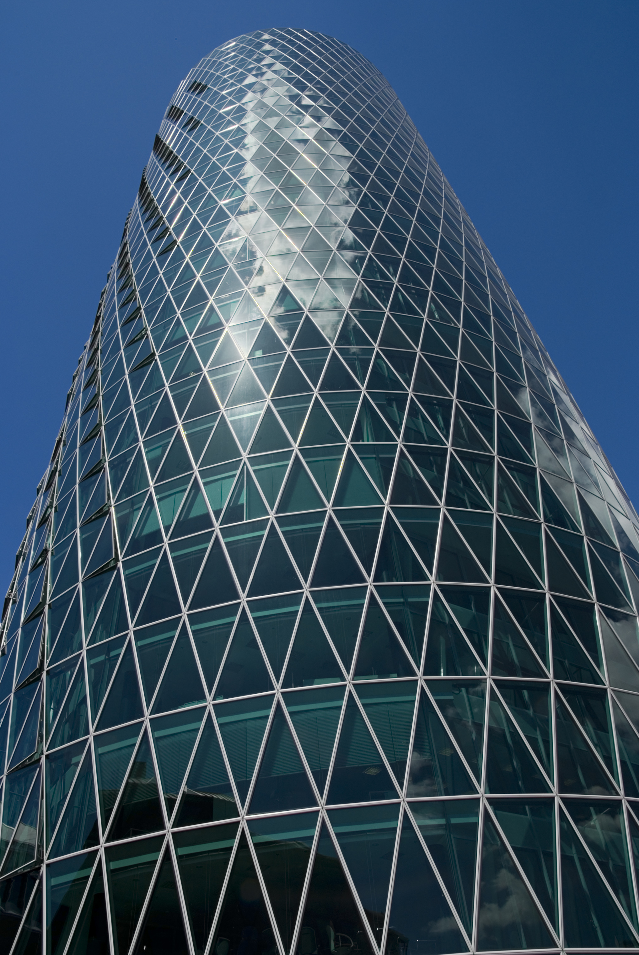 Blick nach oben am Westhafen Tower